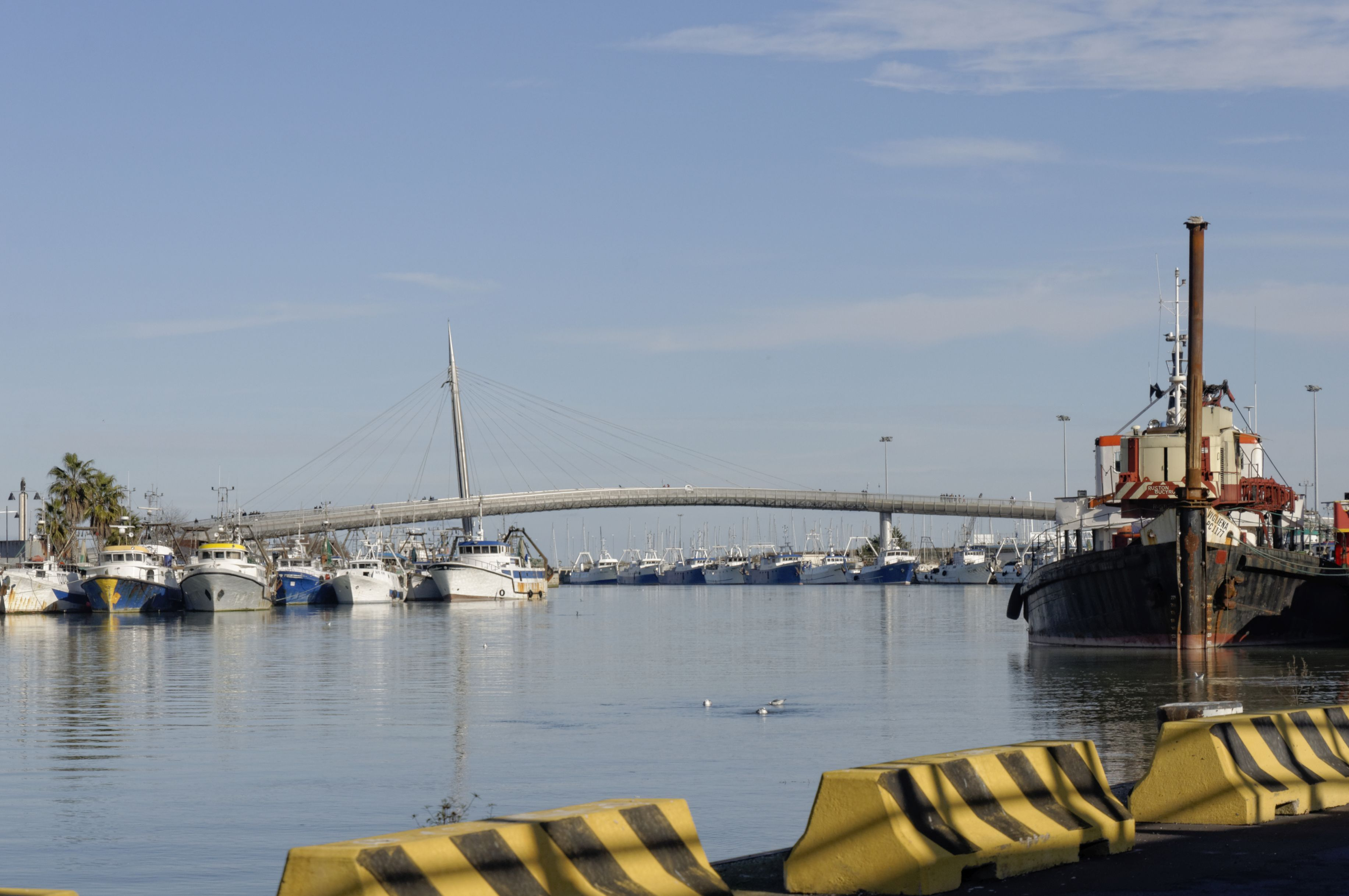 Pescara 2018